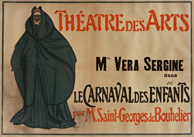 Théatre des Arts. Melle Vera Sergine dans le Carnaval des Enfants par Mr Saint-Georges de Bouhelier :affiche